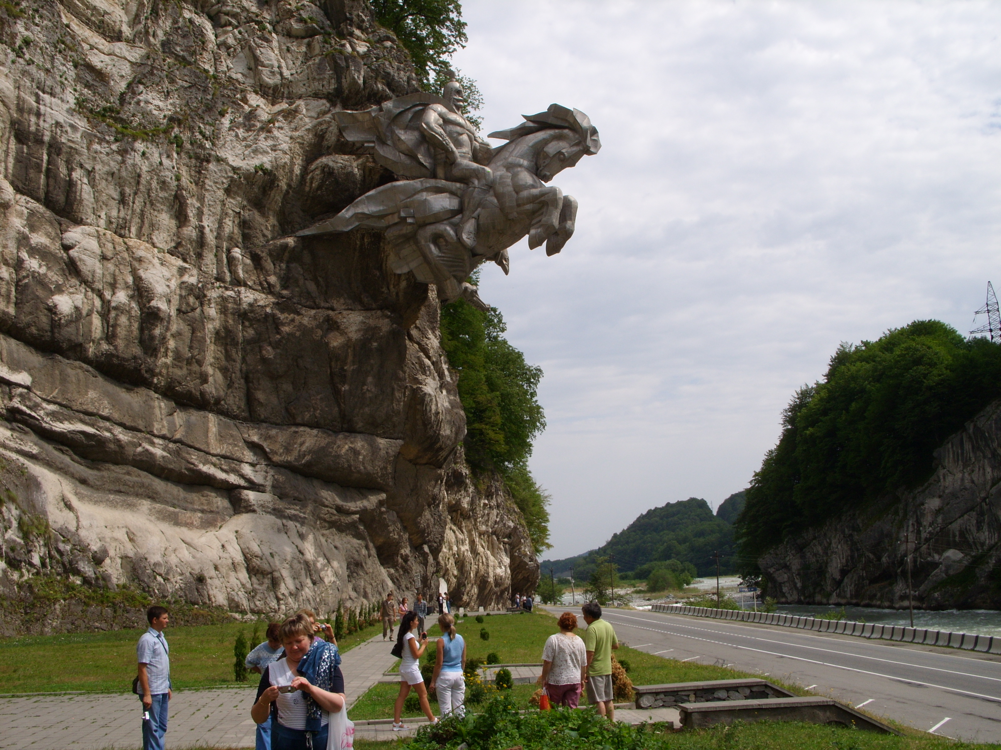 снимки июля 2009 г. экскурсия из Железноводска